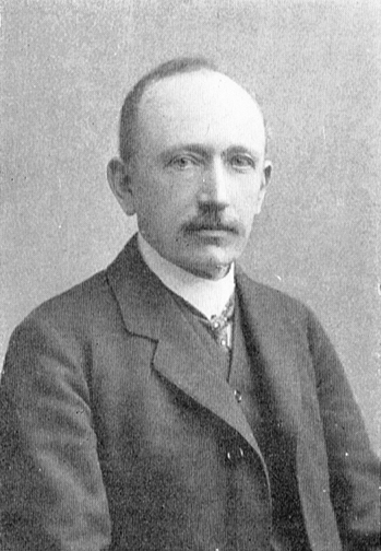 Arkitekten Carl Fredrik Ebeling